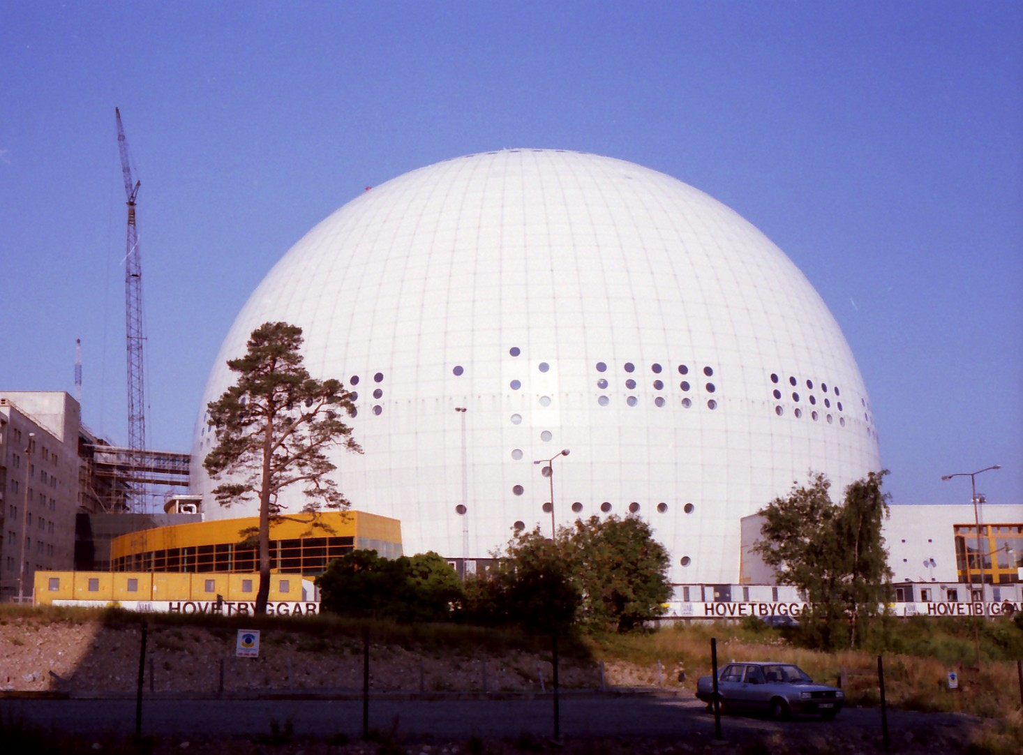 Globen och Globenområdet i Stockholm i augusti 1988